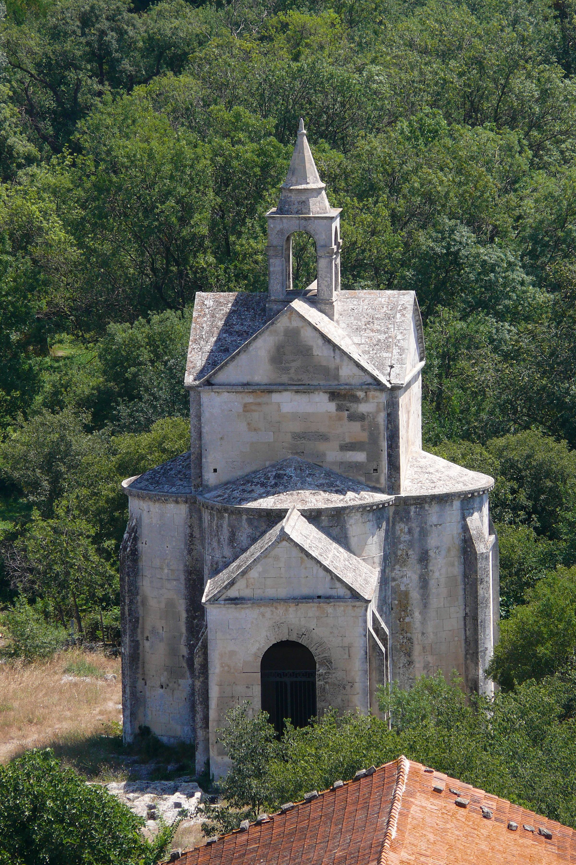 Die Kapelle St.Croix nahe Arles